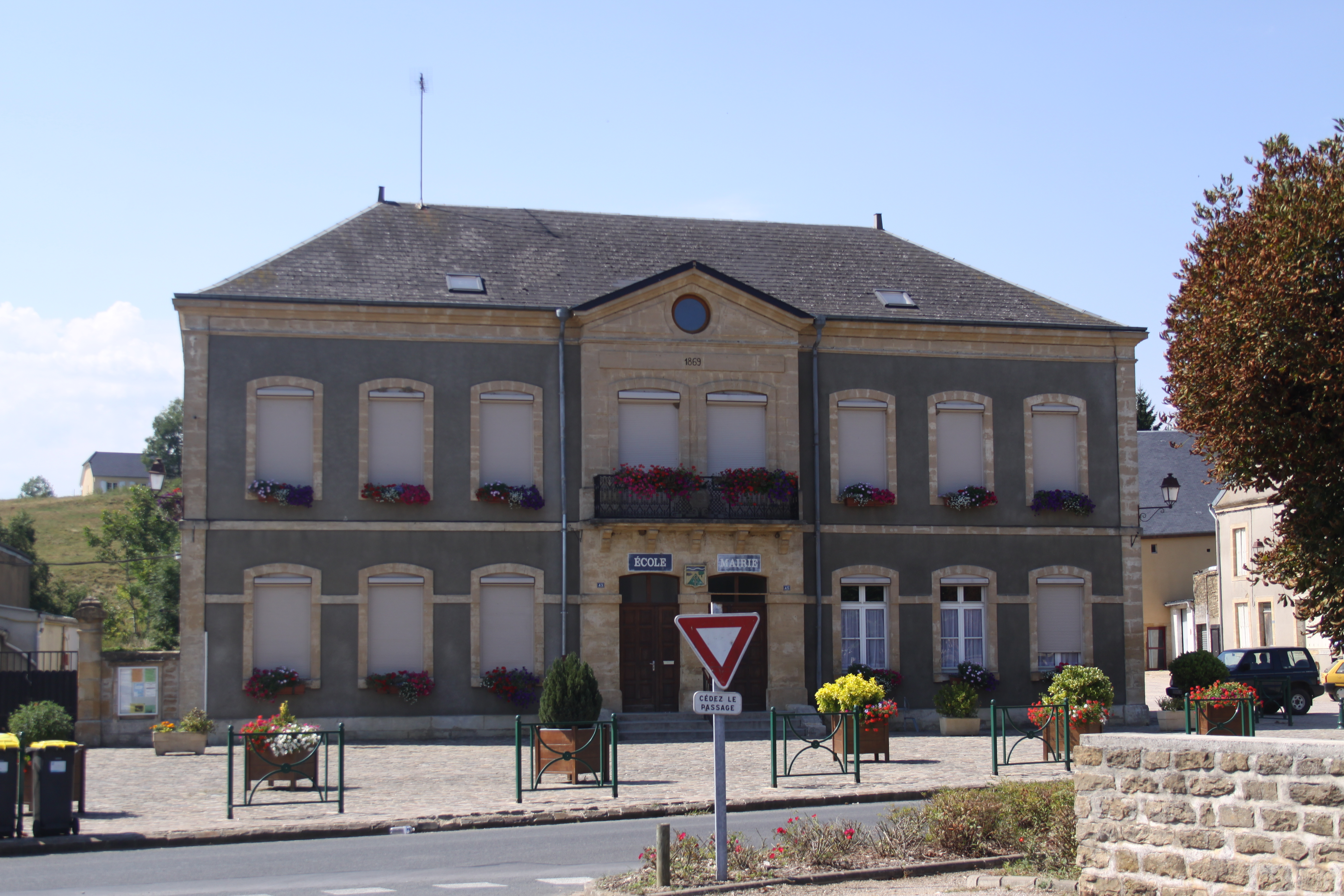 Village Ardennais